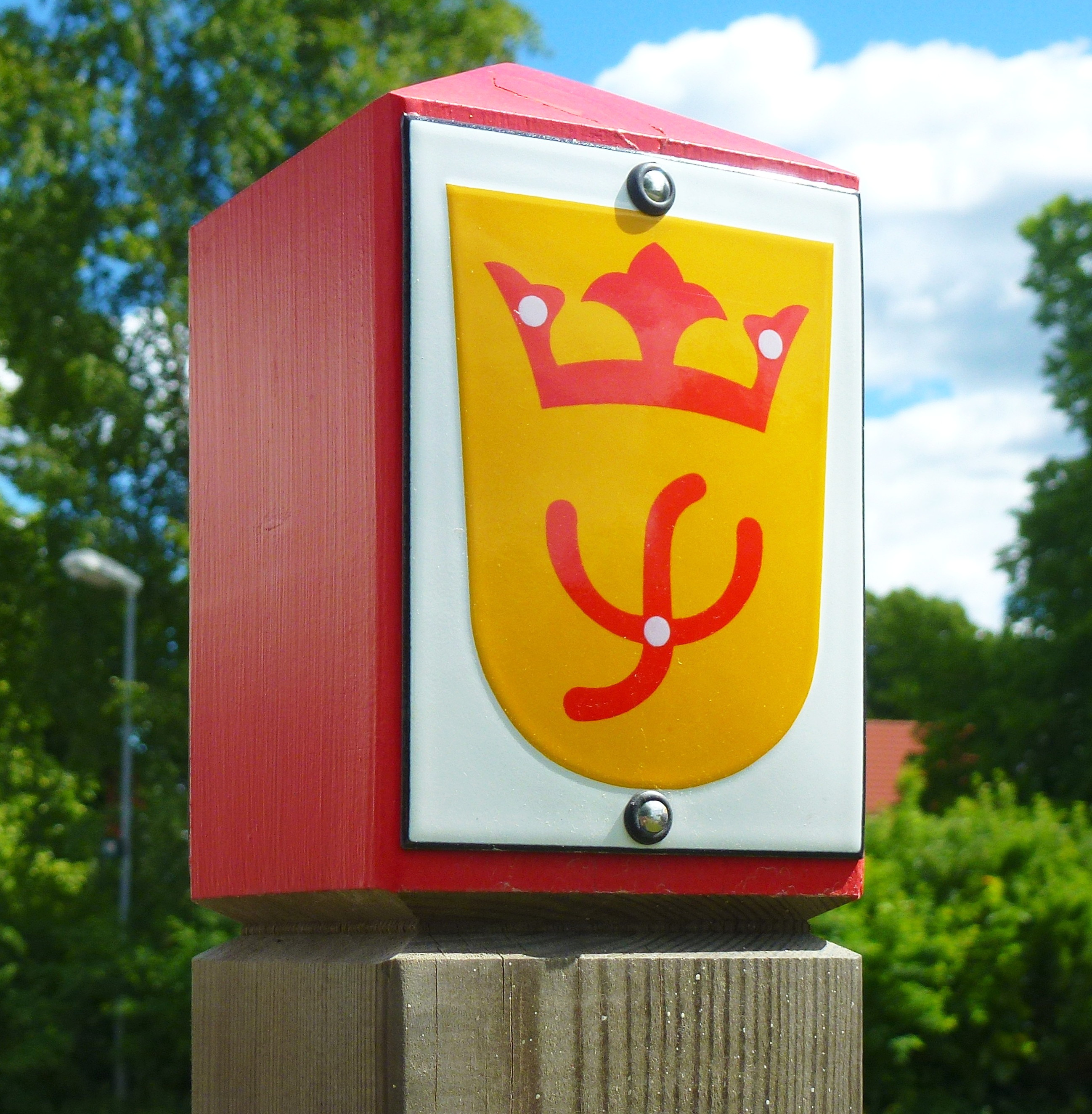 Ingegerdsledens markering vid Eds kyrka